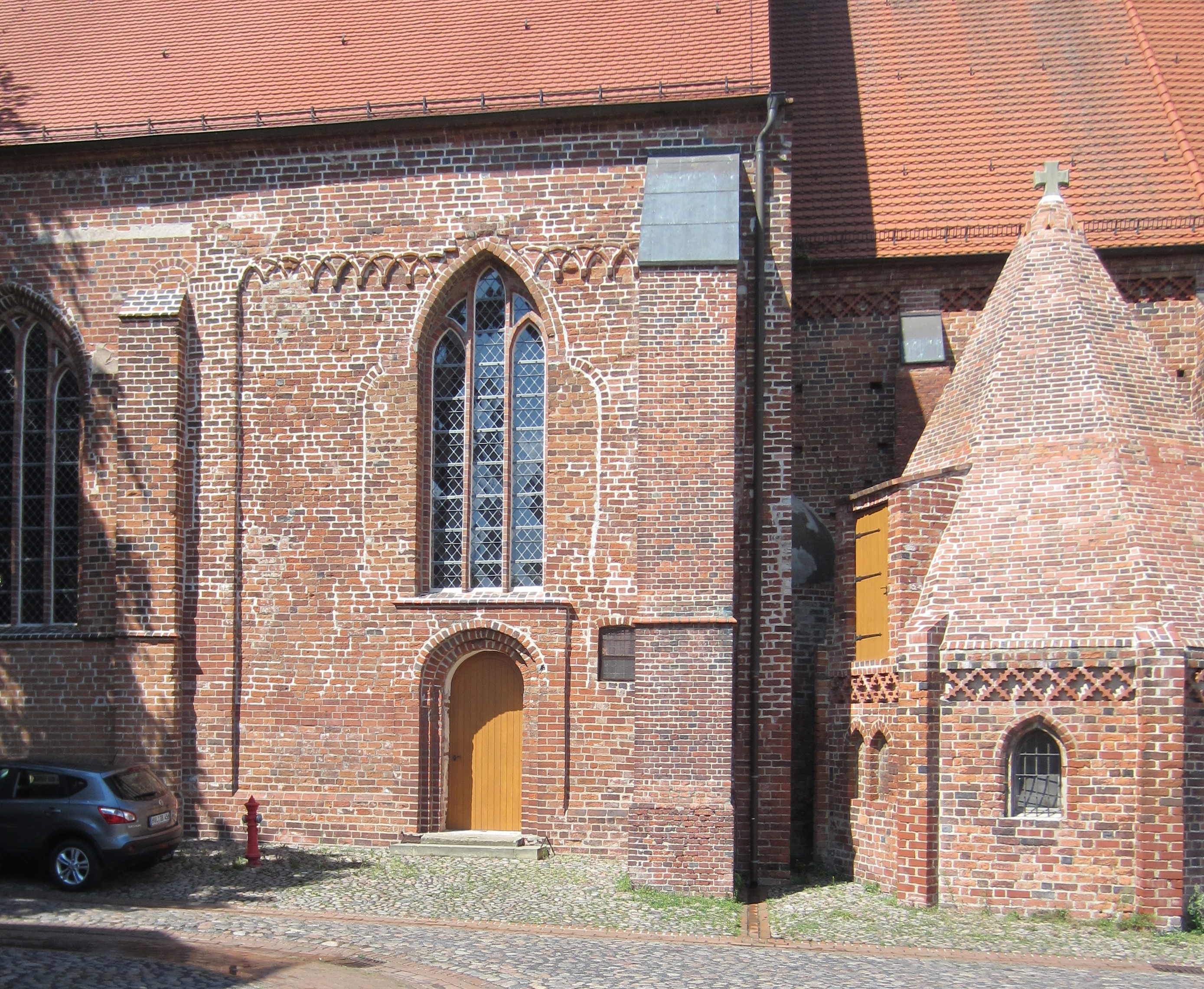 Rathenow, Stadtpfarrkirche St. Marien und Andreas, Teilansicht der Südfassade mit in den spätgotischen Bau integriertem Giebel des romanischen Querschiffs